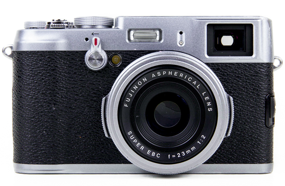 Fujifilm X100, Ansicht vorne